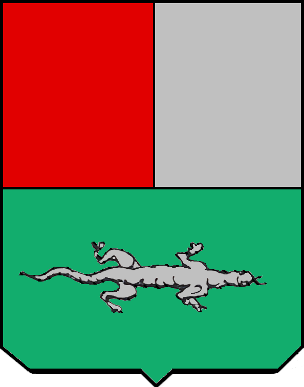 riproduzione